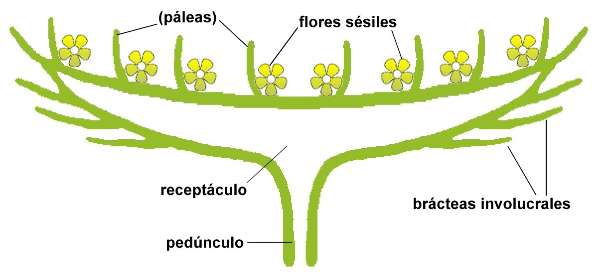 Esquema de un capítulo (botánica) con sus componentes.